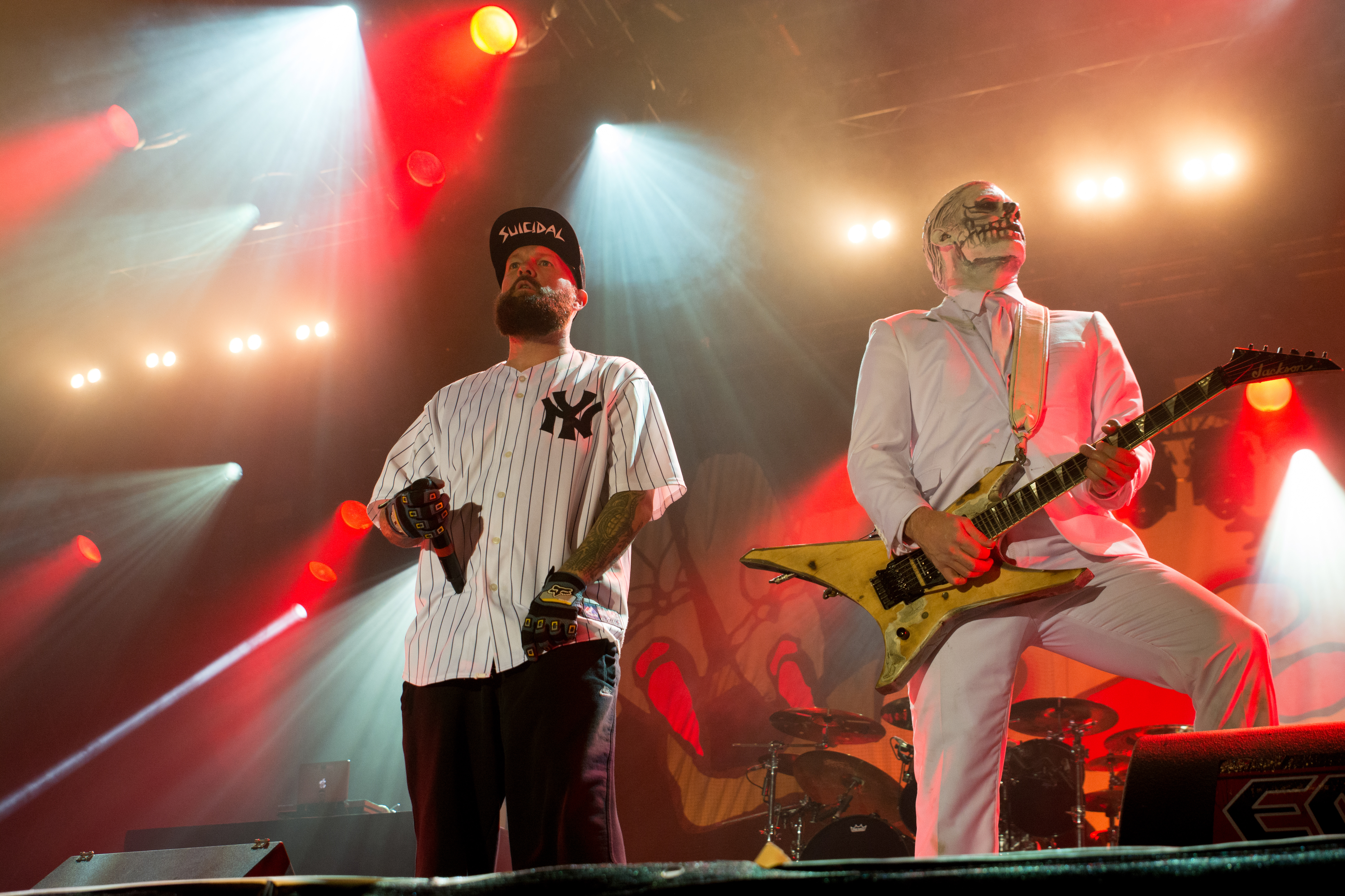 Limp Bizkit beim Reload Festival 2016 in Sulingen